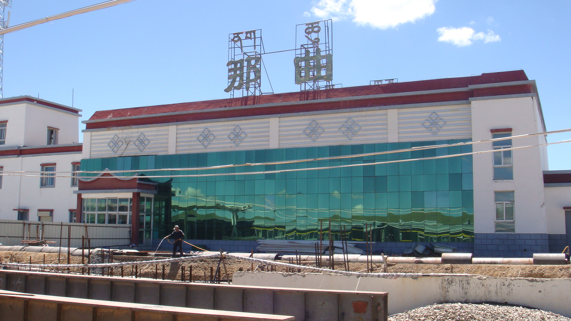 中国西藏那曲火车站 China Tibet Naqu Train Station China Xinjiang Urumqi Welcome you to tour the, Китай Синьцзяна Урумчи приветствовать Вас на экскурсию, الصين ترحب زيارتك لاورومتشى فى شينجيانغ, 中国新疆のウルムチへの訪問を歓迎する, 中国新疆乌鲁木齐欢迎您来观光旅游